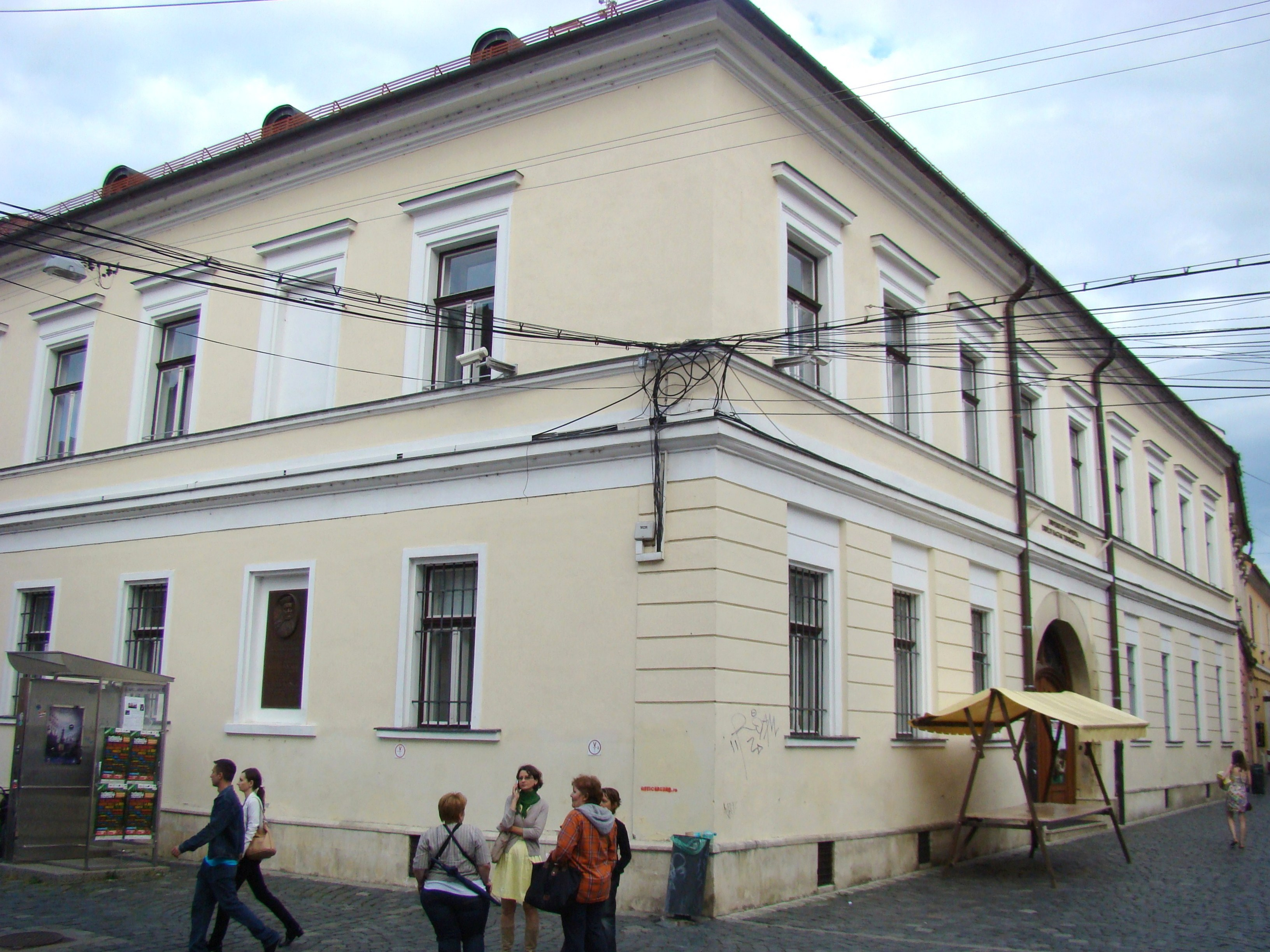 Casa principelui Transilvaniei Ștefan Bocskay